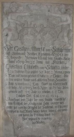 Kirche Gröben, Brandenburg. Vorraum rechts. Grabplatte Gustav Albrecht von Schlabrendorf, 1631-1703